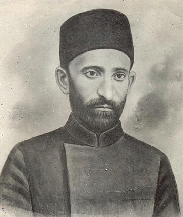 Mirza Alakbar